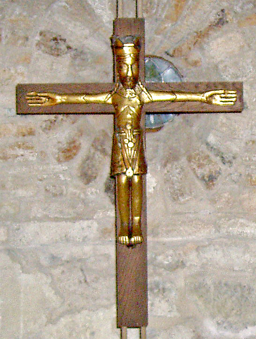 Kopi af Åby-korset i Kryptkirken under Vor Frue Kirke. Originalen befinder sig på Nationalmuseet i København